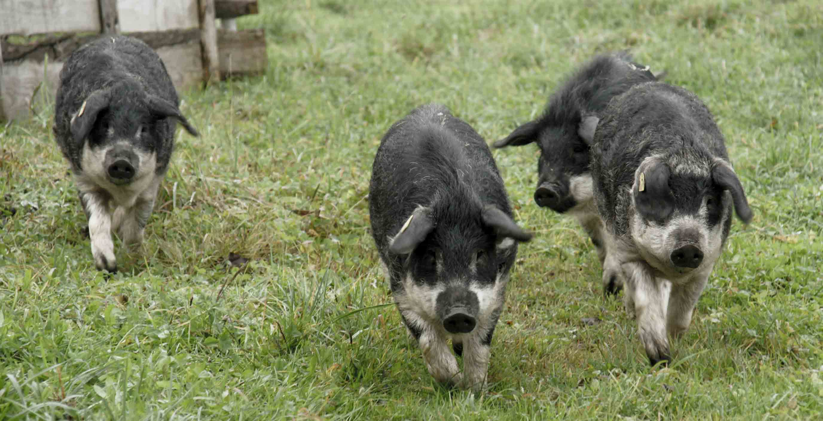 Mangalica, Wollschwein, Eber